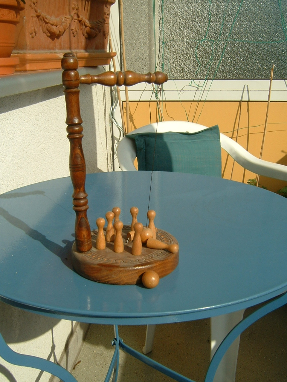 mechanisches Tischkegelspiel aus gedrechseltem Holz, an der Seite Ziehknopf zum Aufstellen der Kegel